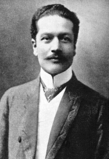 José Matías Manzanilla Barrientos (1867-1947) abogado, jurista y político peruano. Presidente de la Cámara de Diputados (1909 y 1916); Primer Ministro y Ministro de RR.EE. (1932-1932). Autor de un célebre proyecto de legislación laboral a favor de la clase obrera (Proyecto Manzanilla, 1904)